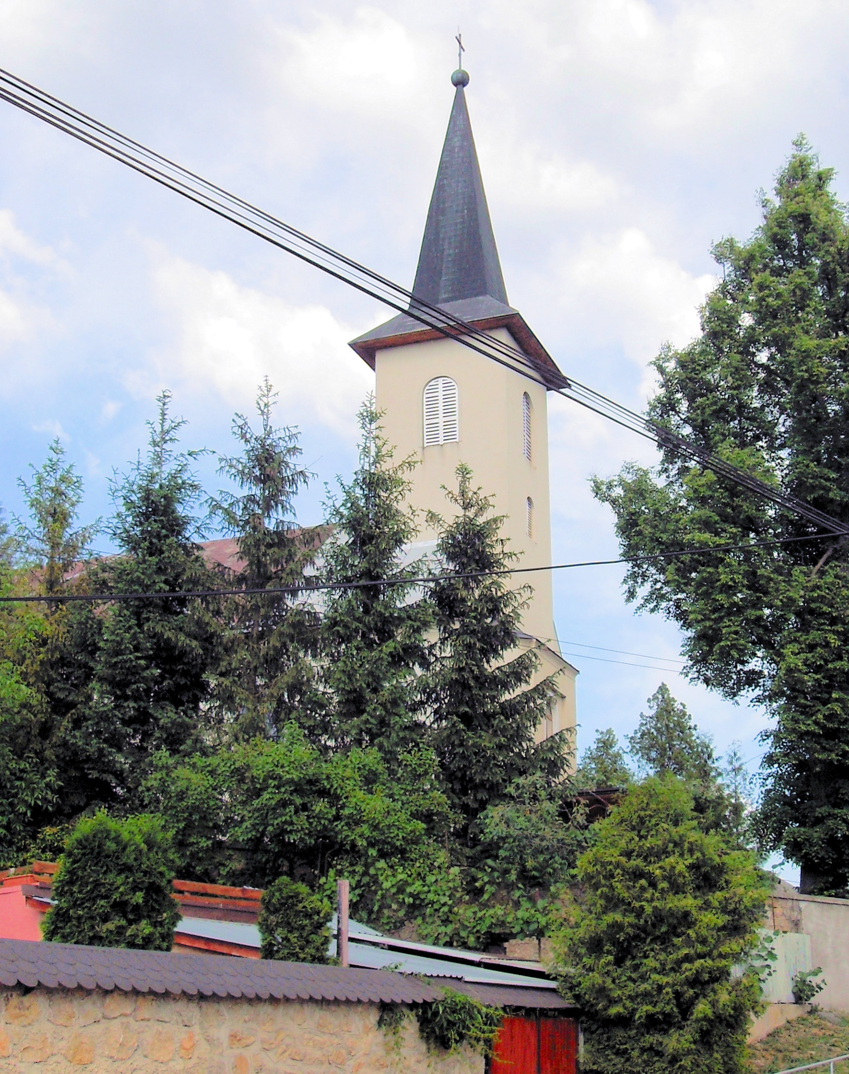 Rímskokatolícky kostol Svätého Martina z Tours Drienovec